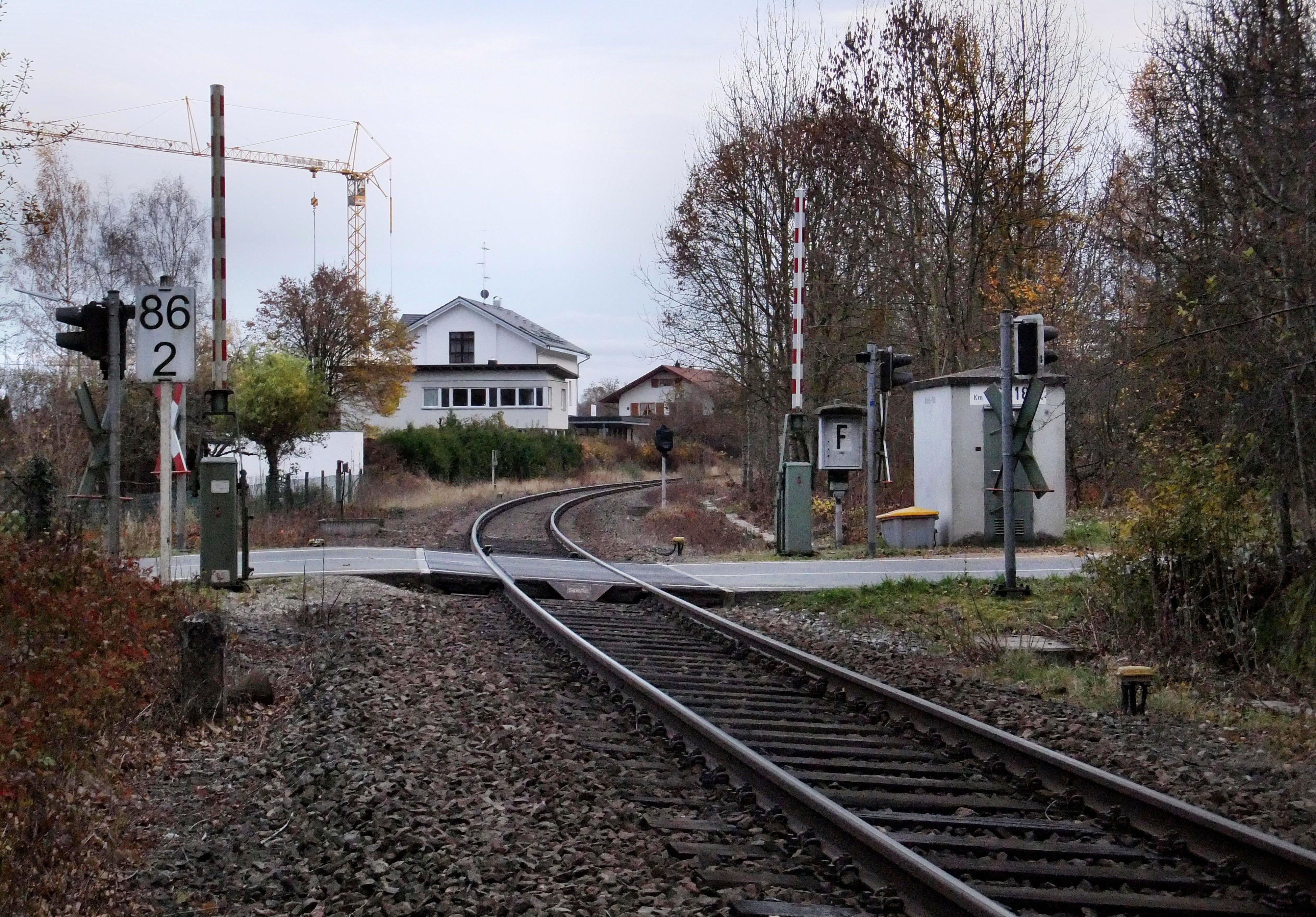 Die Bahnstrecke Ulm–Donaueschingen bei Kilometer 86,2 in Scheer in Baden-Württemberg (Deutschland), Blickrichtung Ulm